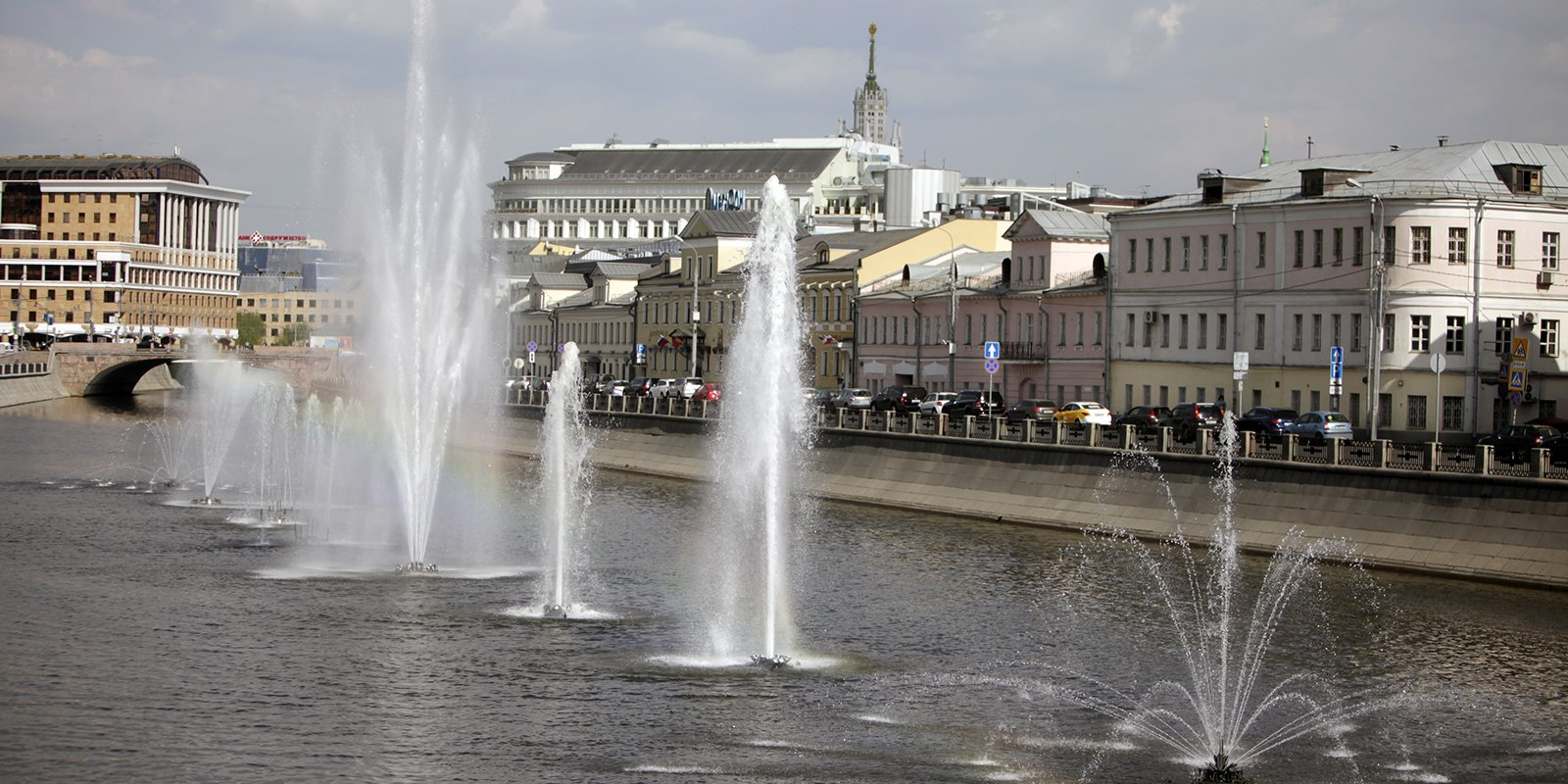 Плавающие фонтаны на Водоотводном канале